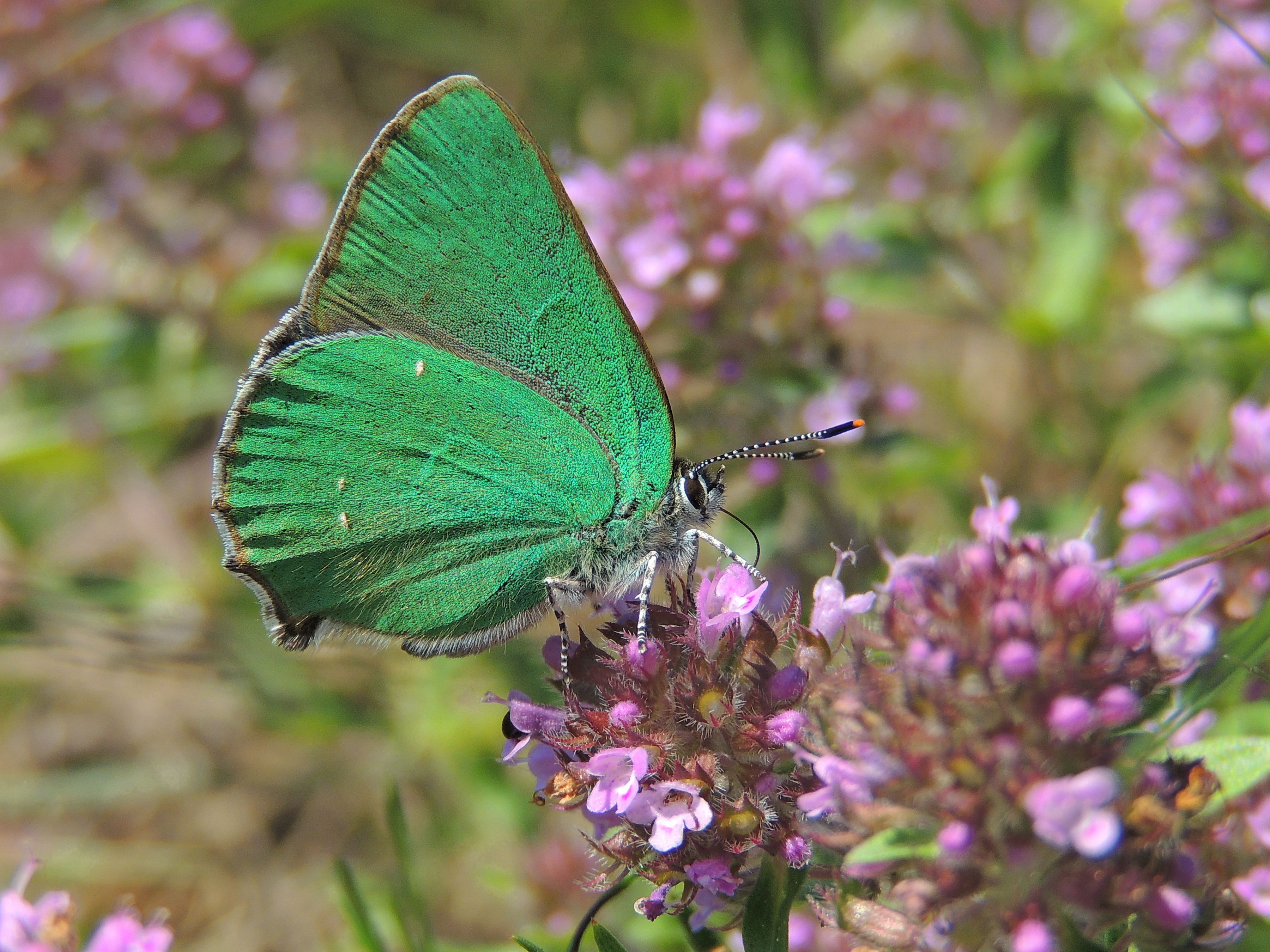 green hairstreak grüner Zipfelfalter